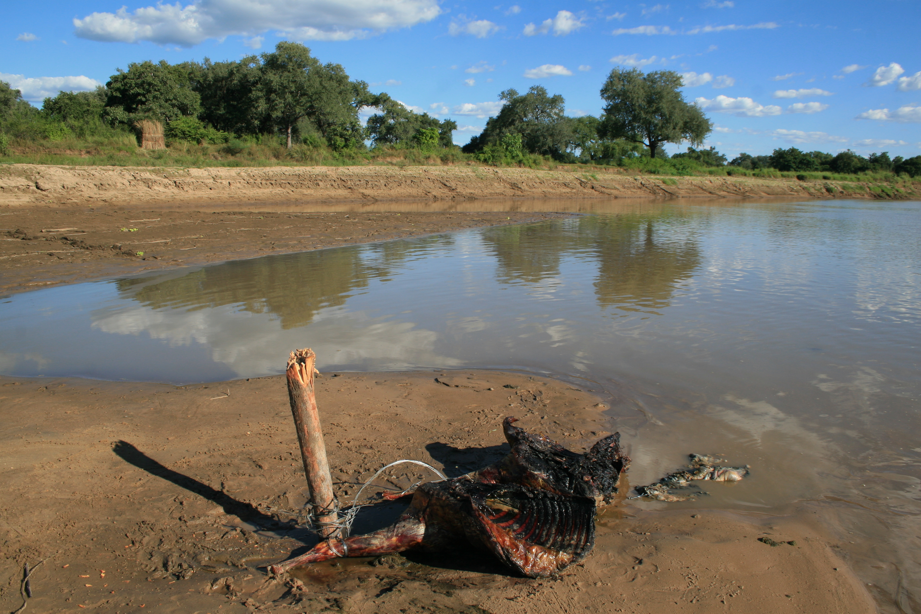 Bait for a Crocodile, Zambia